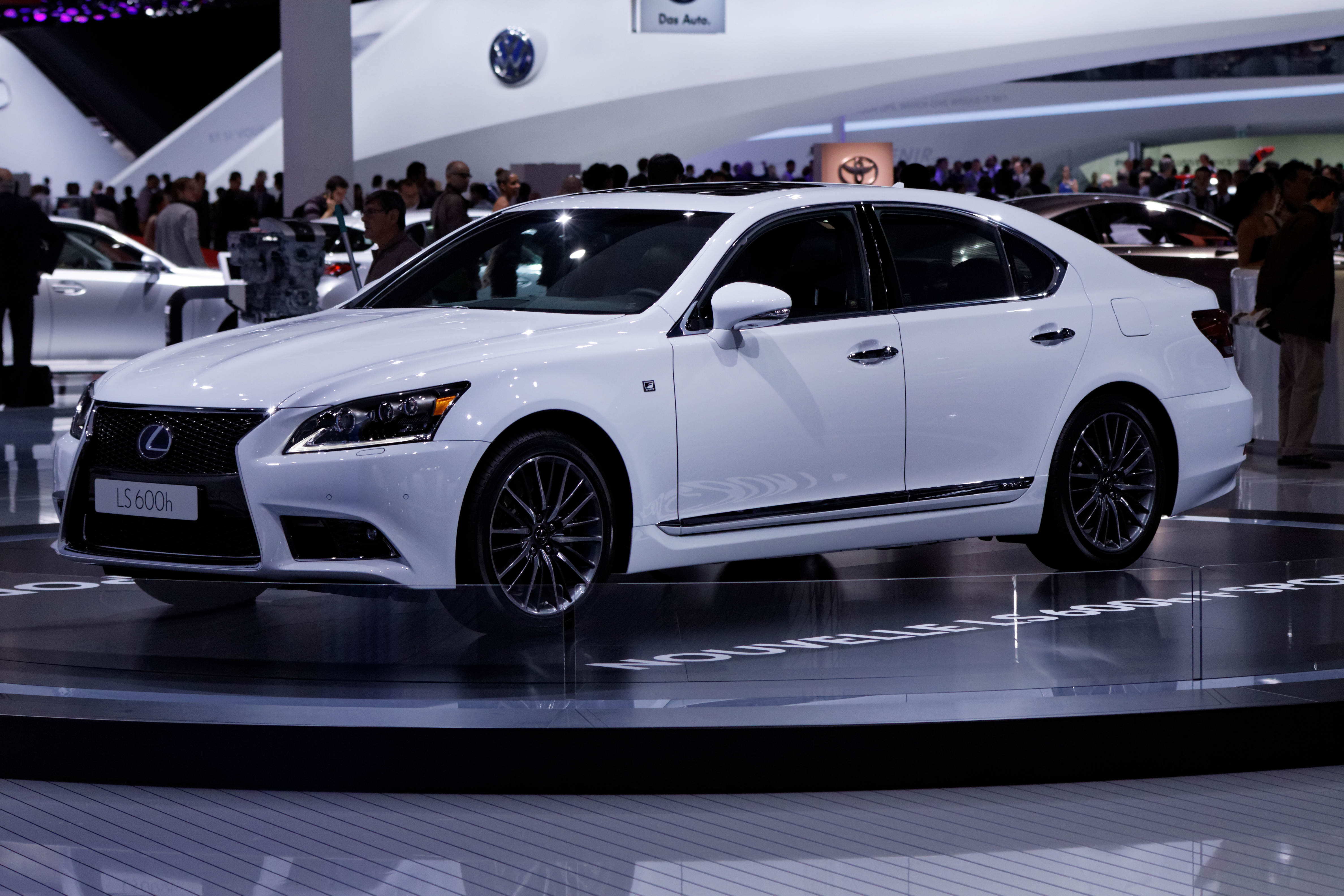 Une Lexus Ls 600h présentée lors du Mondial de l'automobile de Paris 2012.